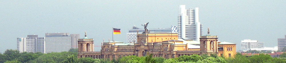 Das Maximilianeum (München) mit Hochhäusern im Hintergrund